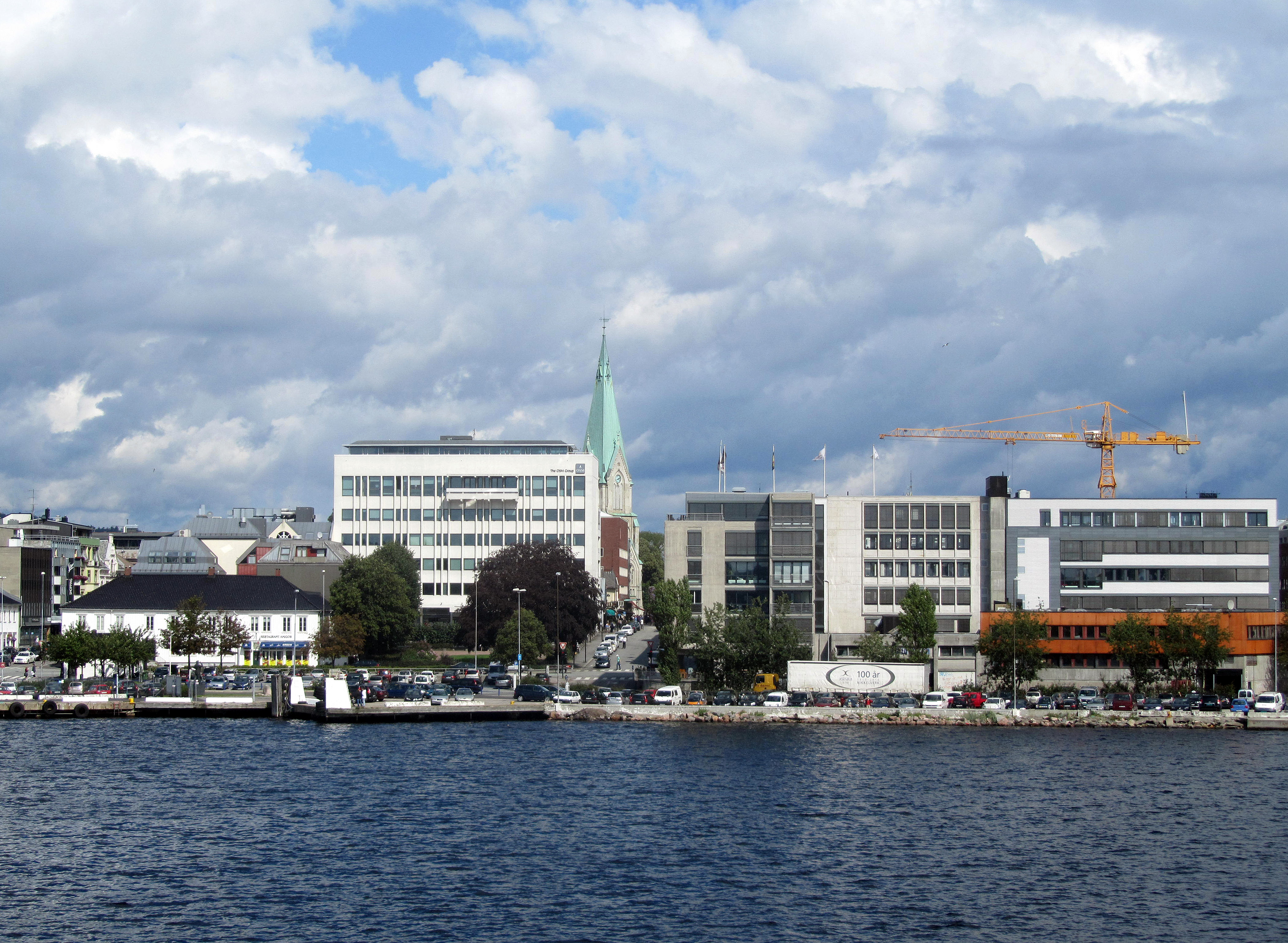 Kristiansand set fra havnen